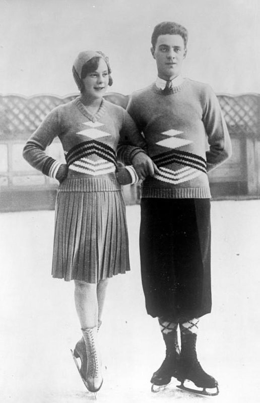 Die besten Eiskunstläufer der Welt ! Die Weltmeisterin im Eiskunstlauf Sonja Henie, Oslo, und der Weltmeister Carl Schäfer, Wien, errangen auf der Winter-Olympiade in Lake Placid die goldene Medaille und damit den Weltmeistertitel im Eiskunstlauf.